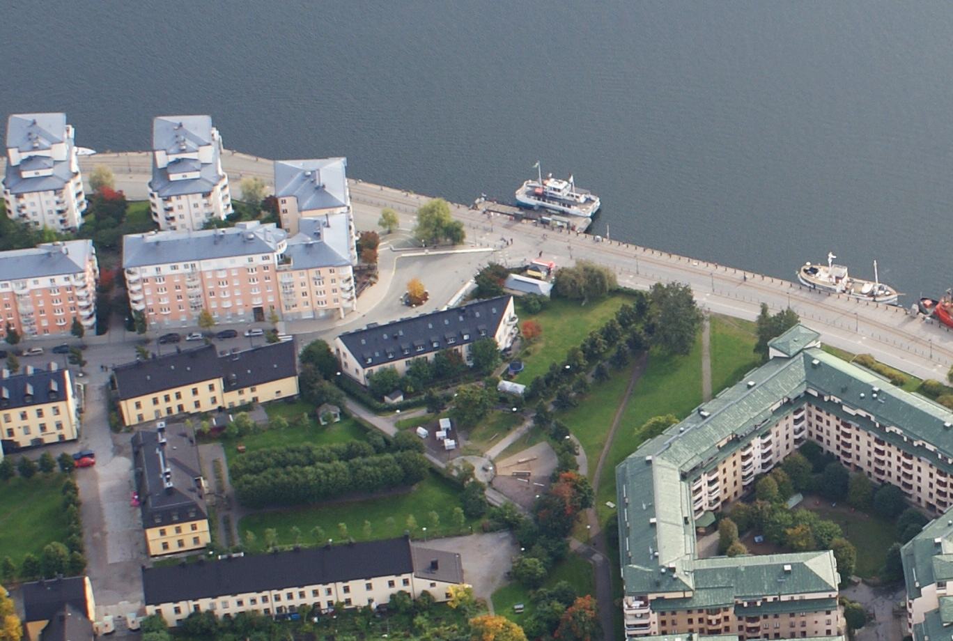 Barnängsparken sedd från helikopter.